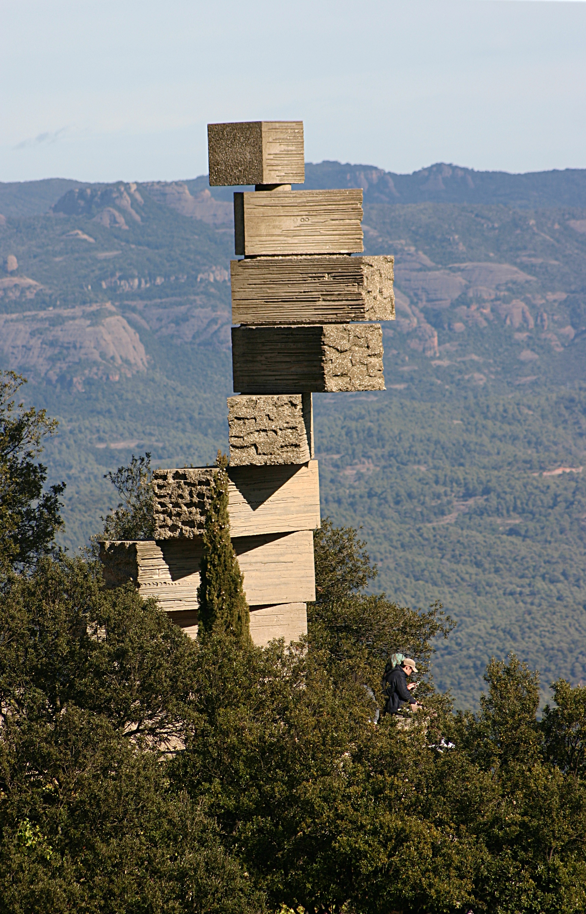 Mosteiro de Montserrat